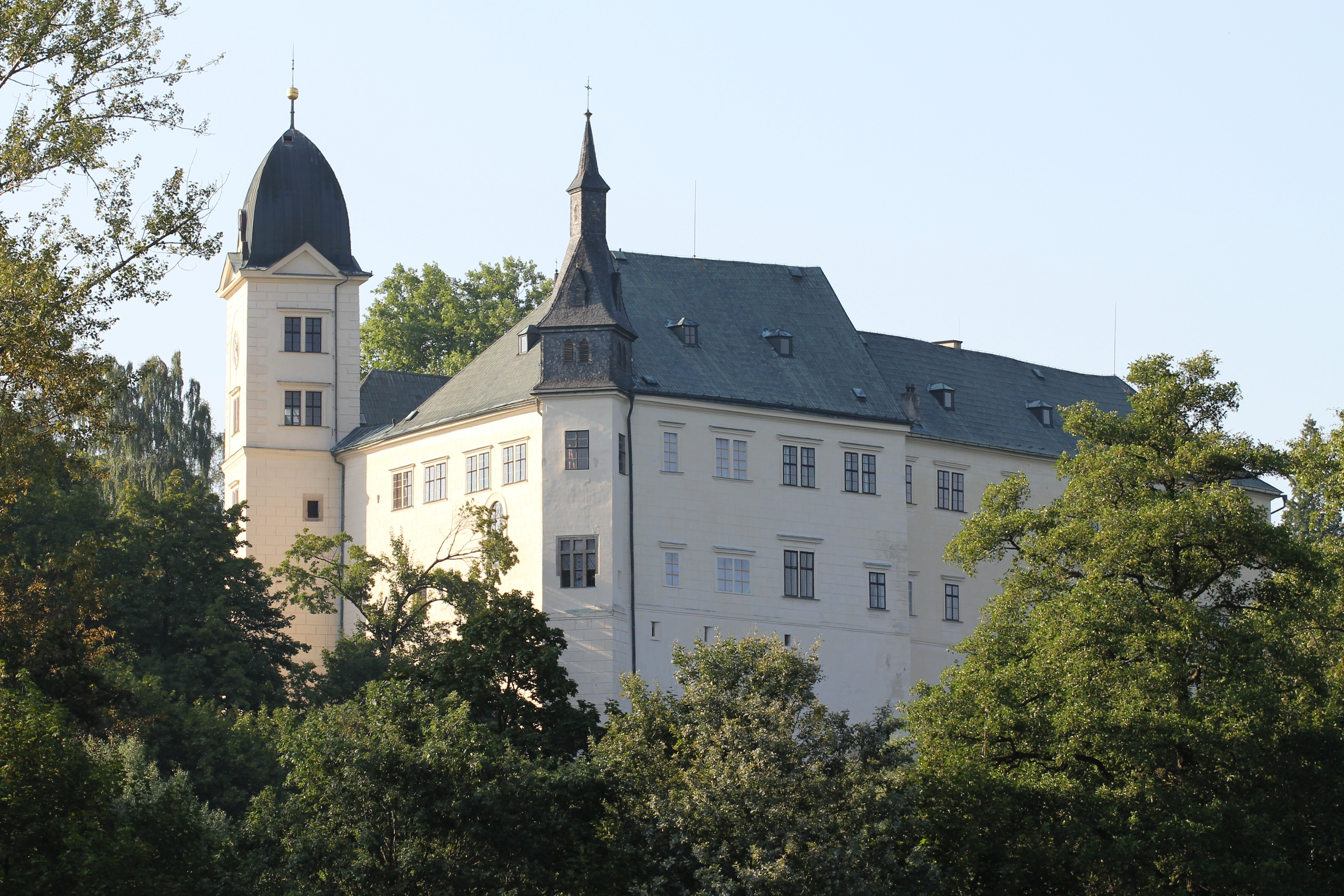 Hrubý Rohozec z údolí Jizery